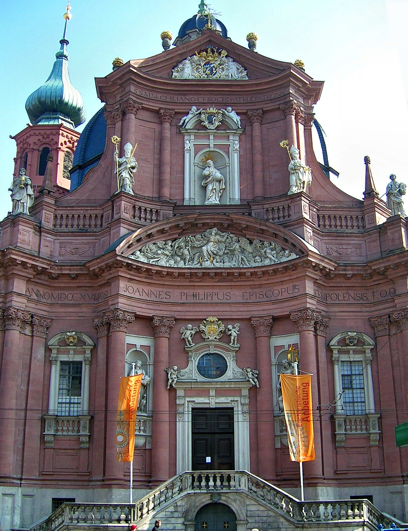 Neumünster Würzburg